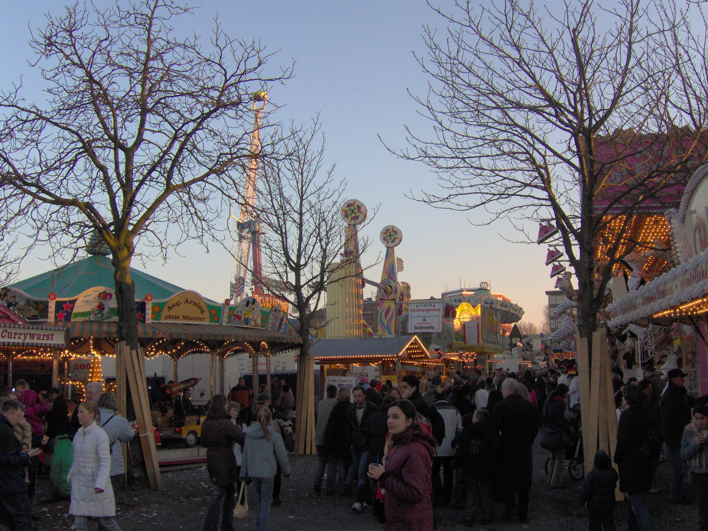 Send in Münster.